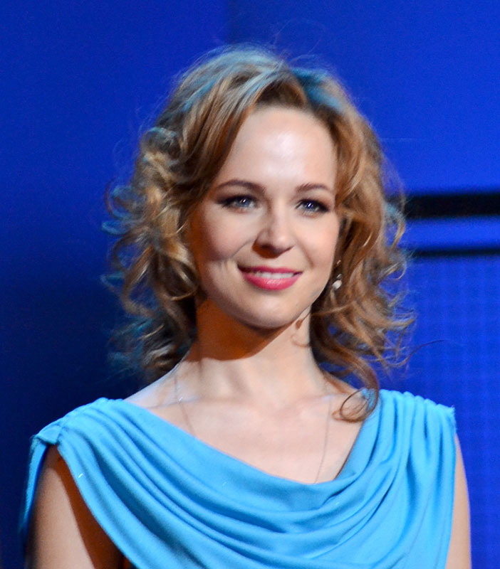 Актриса театра и кино Ирина Медведева.